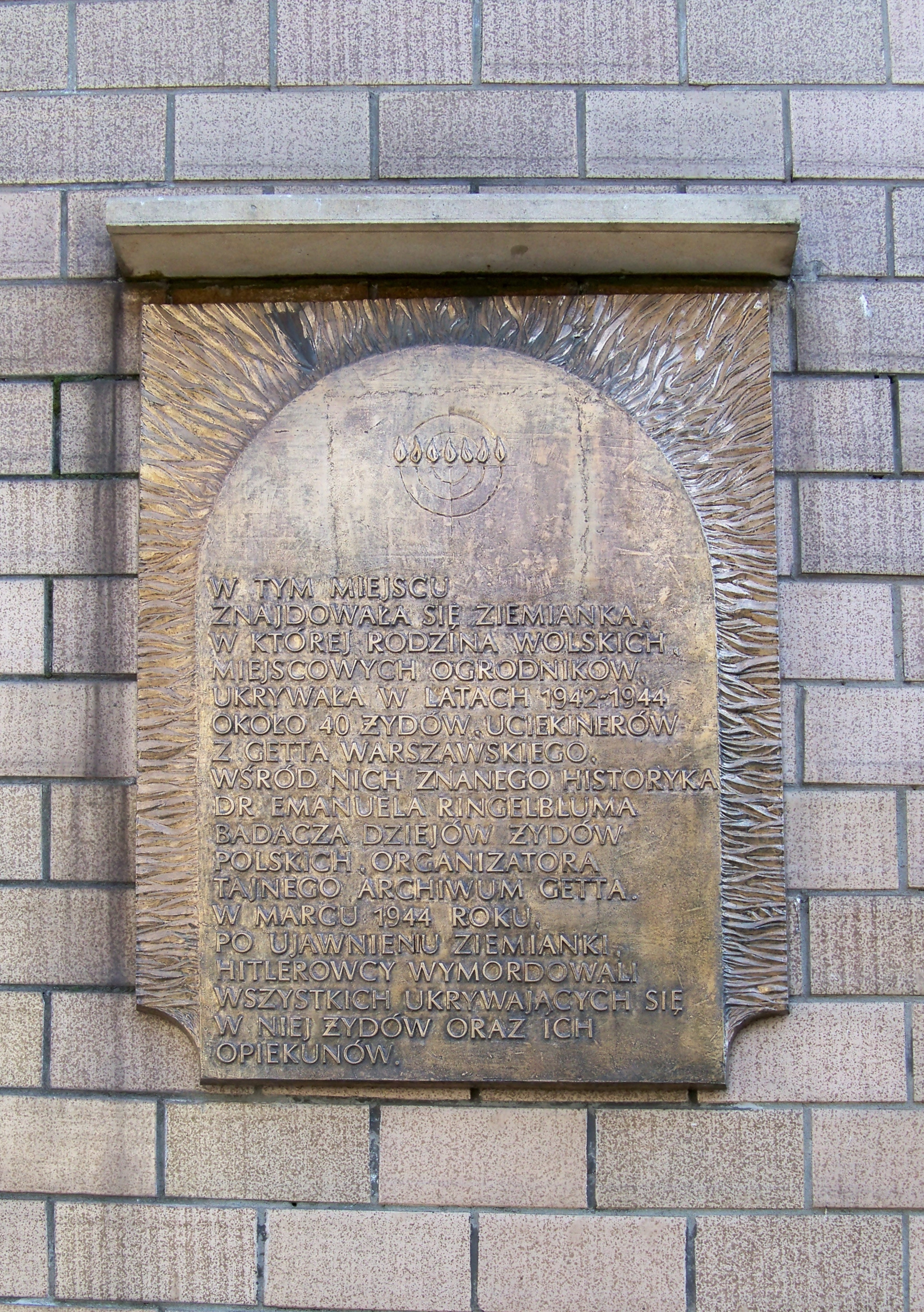 Tablica upamiętniająca ukrywanie Żydów z warszawskiego getta, ul. Grójecka 77 w Warszawie.